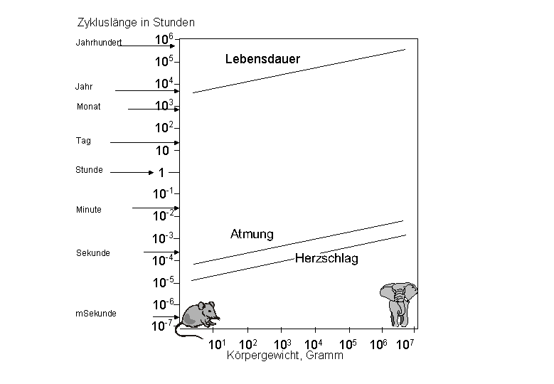 Allometrie Maus-Elefant-Diagramm selbst gezeichnet GNU-FDL Zoph